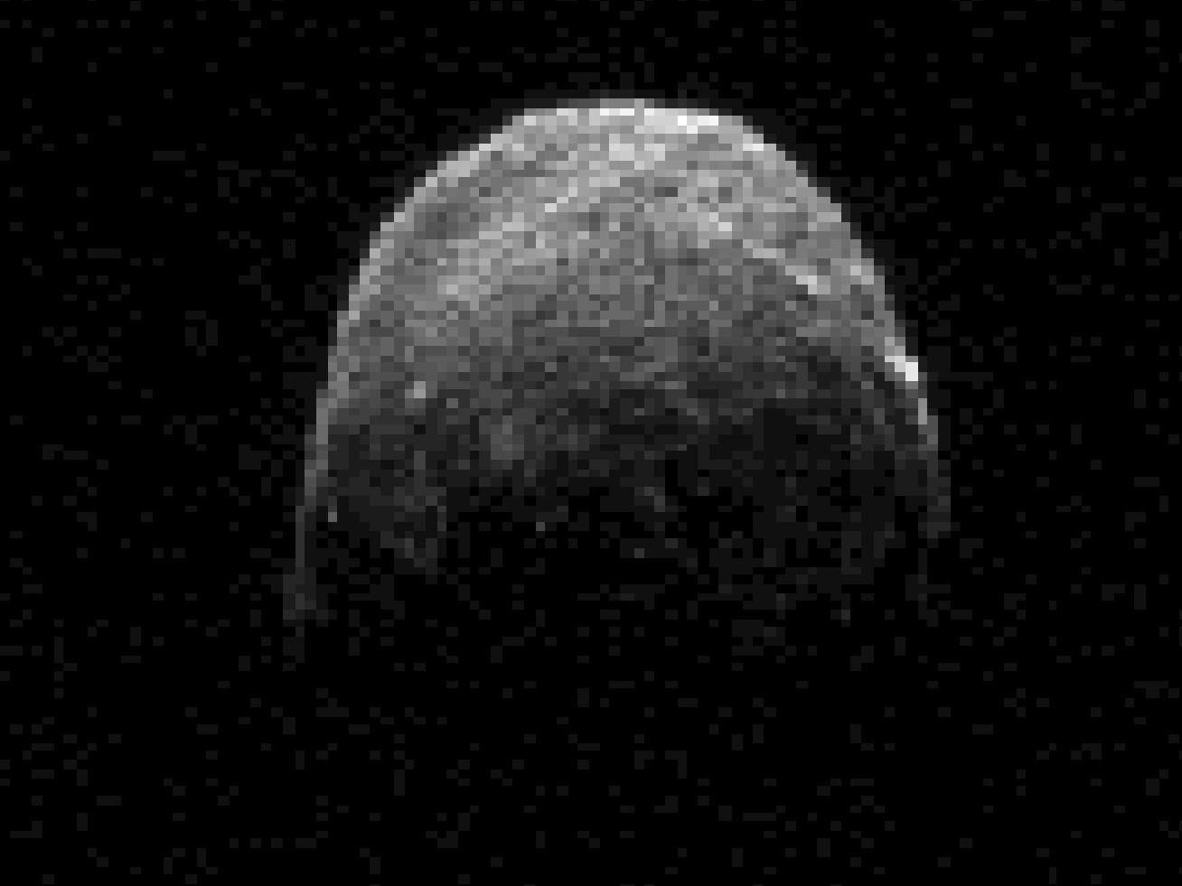 Fotografia Asteroide 2013 TV135 Octubre 2013